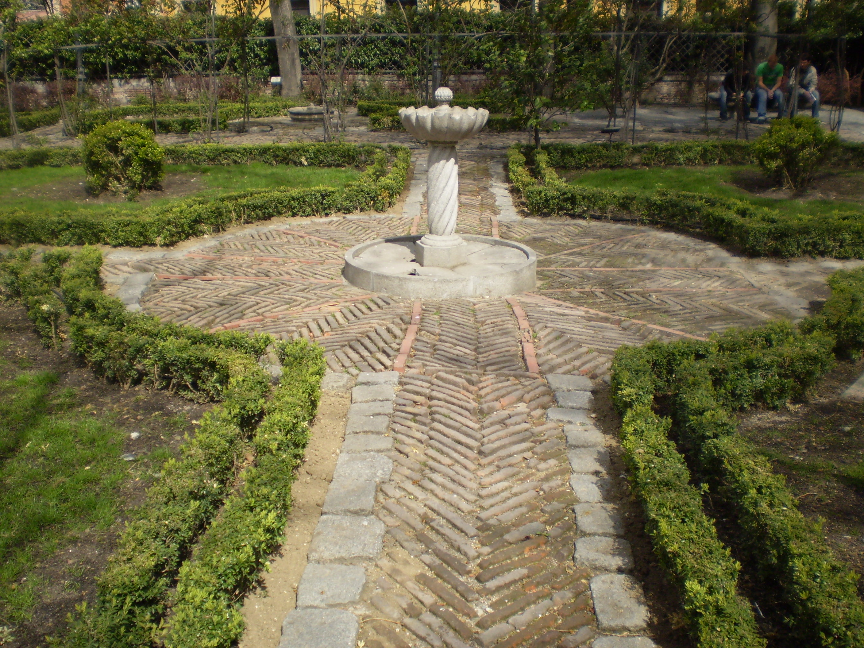 Jardín del Príncipe de Anglona. 18th garden. Madrid, Spain